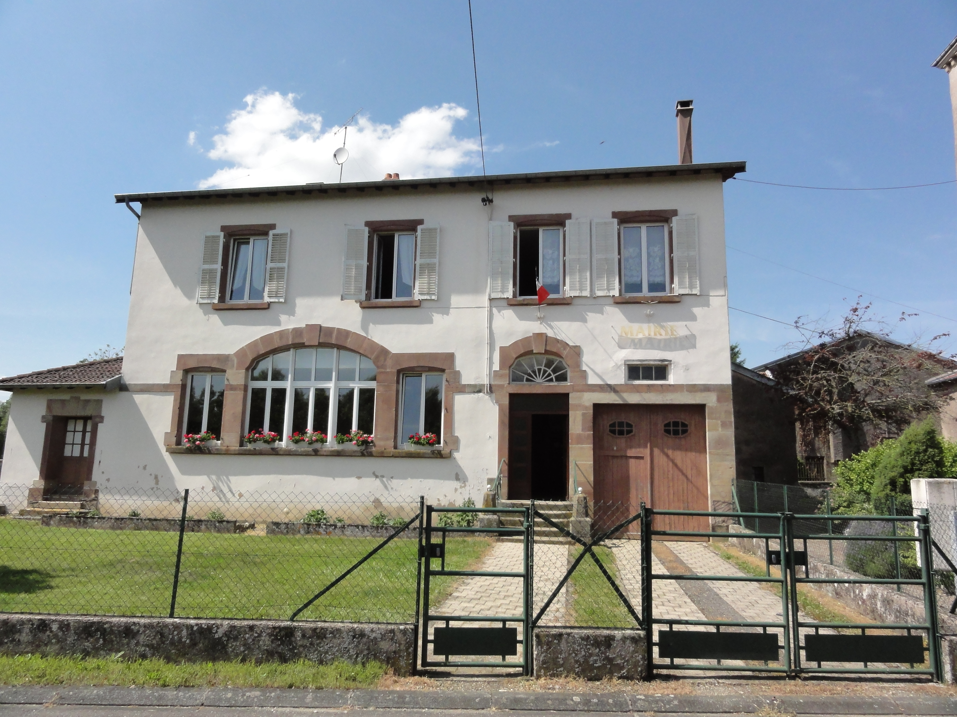 Gogney (M-et-M) mairie